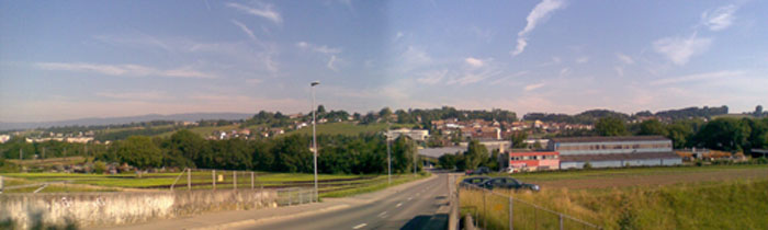 Montage de deux photos de Lonay, prises depuis Préverenges